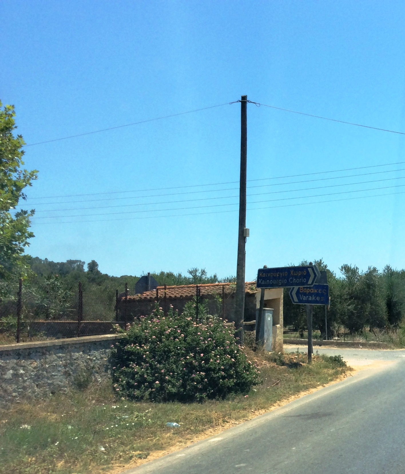 Βαράκες Μεσσηνίας. Επαρχιακή Οδός Πύλου - Μεθώνης: Διασταύρωση προς τους οικισμούς Βαράκες και Καινούργιο Χωριό.